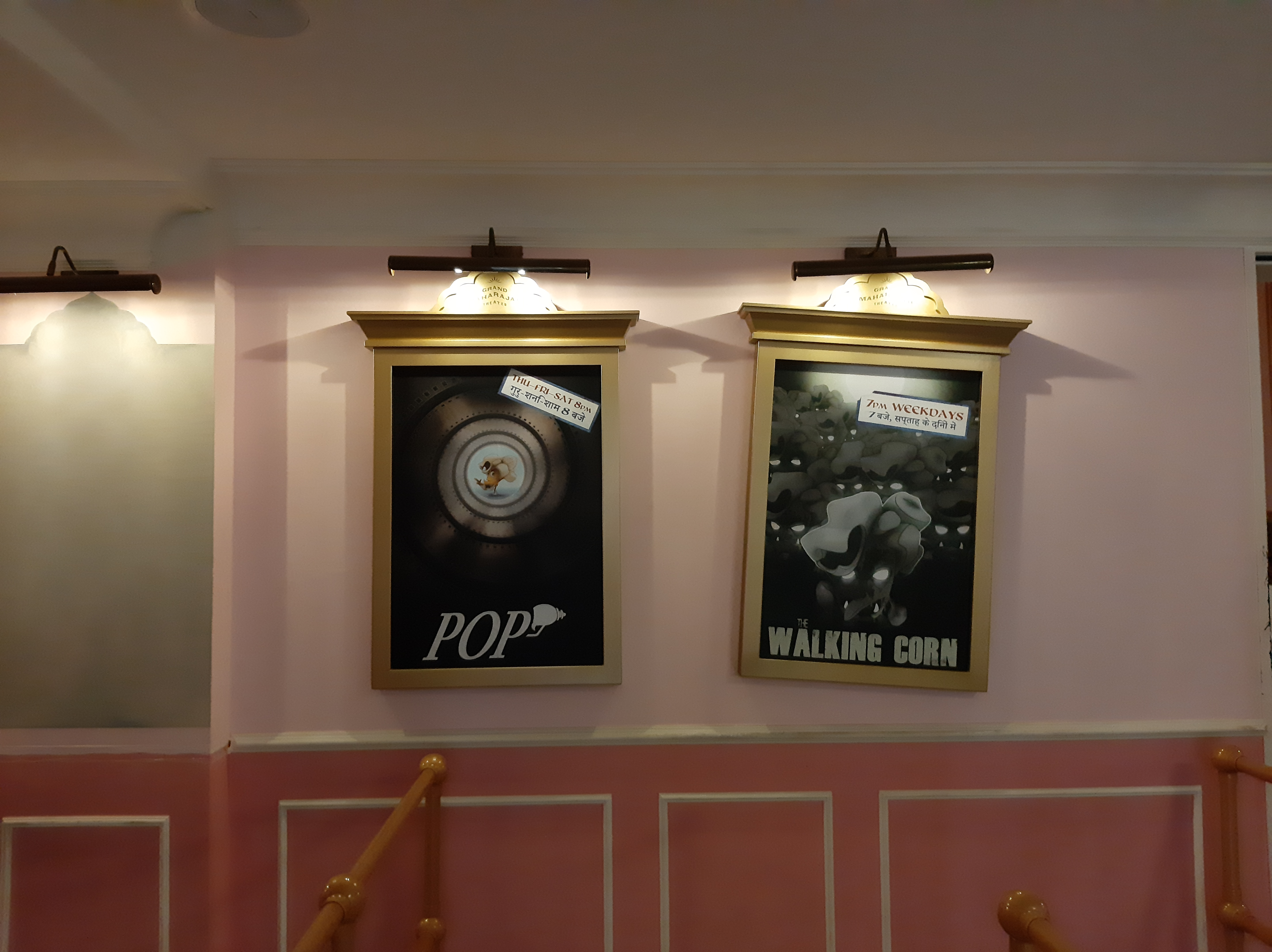 Darkride Popcorn Revenge in Walibi Belgium.